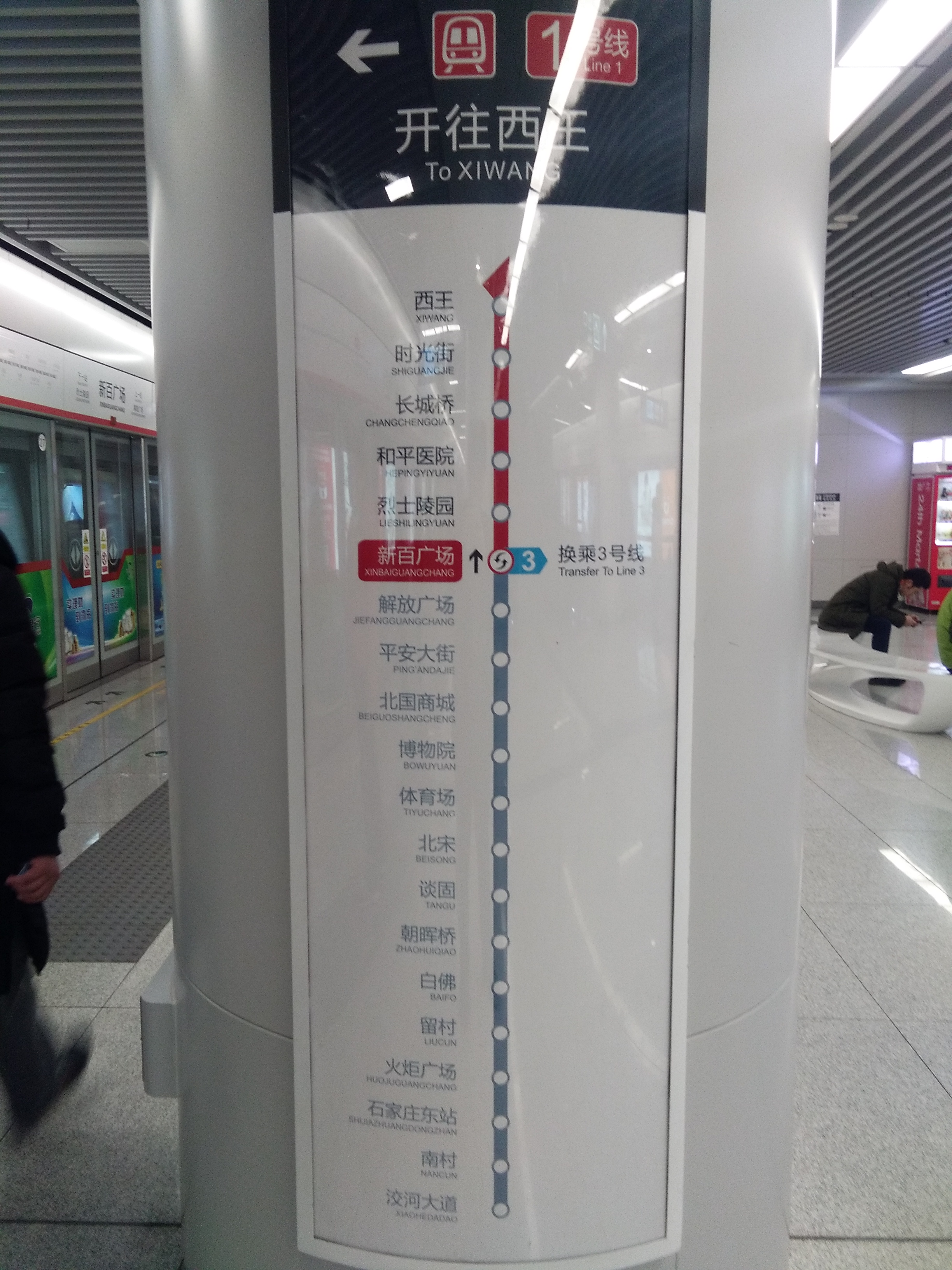 石家庄地铁新百广场转换站